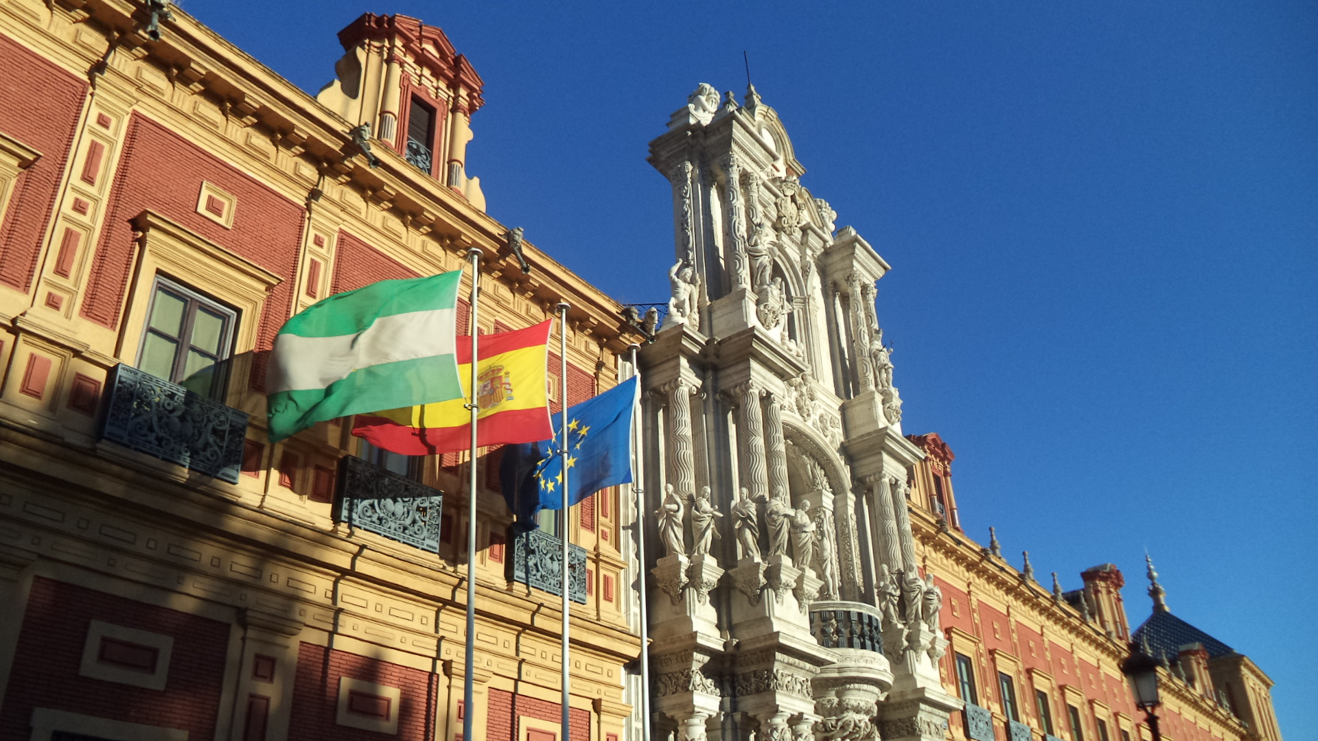 Bandera de Andalucía, España y la Unión Europea junto a la puerta principal del Palacio de San Telmo, sede del gobierno de la Junta de Andalucía